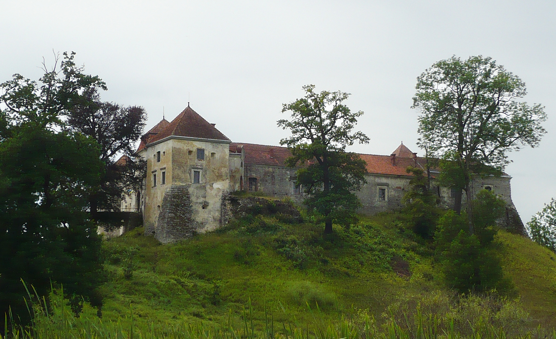 Zamek w Świrzu na Ukrainie. Zamek stanowił pierwotnie własność książąt Świrskich, od XVII wieku należał do rodu Cetnerów, zniszczony podczas wojen kozackich w 1648, zdobyty przez Turków w 1672. Po pierwszym rozbiorze Rzeczypospolitej znalazł się na obszarze zaboru austriackiego. Ostatnimi właścicielami przed 1939 byli Irena z Lamezanów i jej mąż Tadeusz Komorowski, późniejszy dowódca Armii Krajowej i powstania warszawskiego